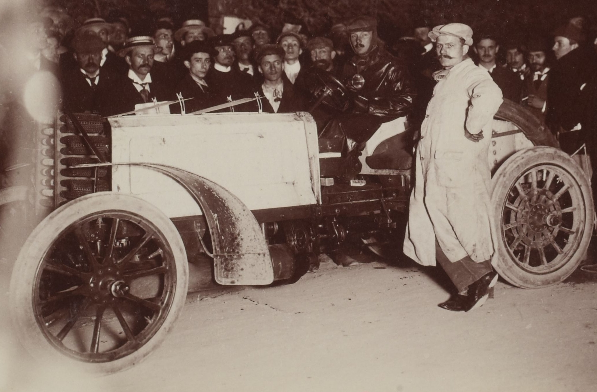 [Collection Jules Beau. Photographie sportive] : T. 18. Année 1902 / Jules Beau : F. 21v. [Paris - Vienne, épreuve de vitesse, Champigny, 26 juin 1902]